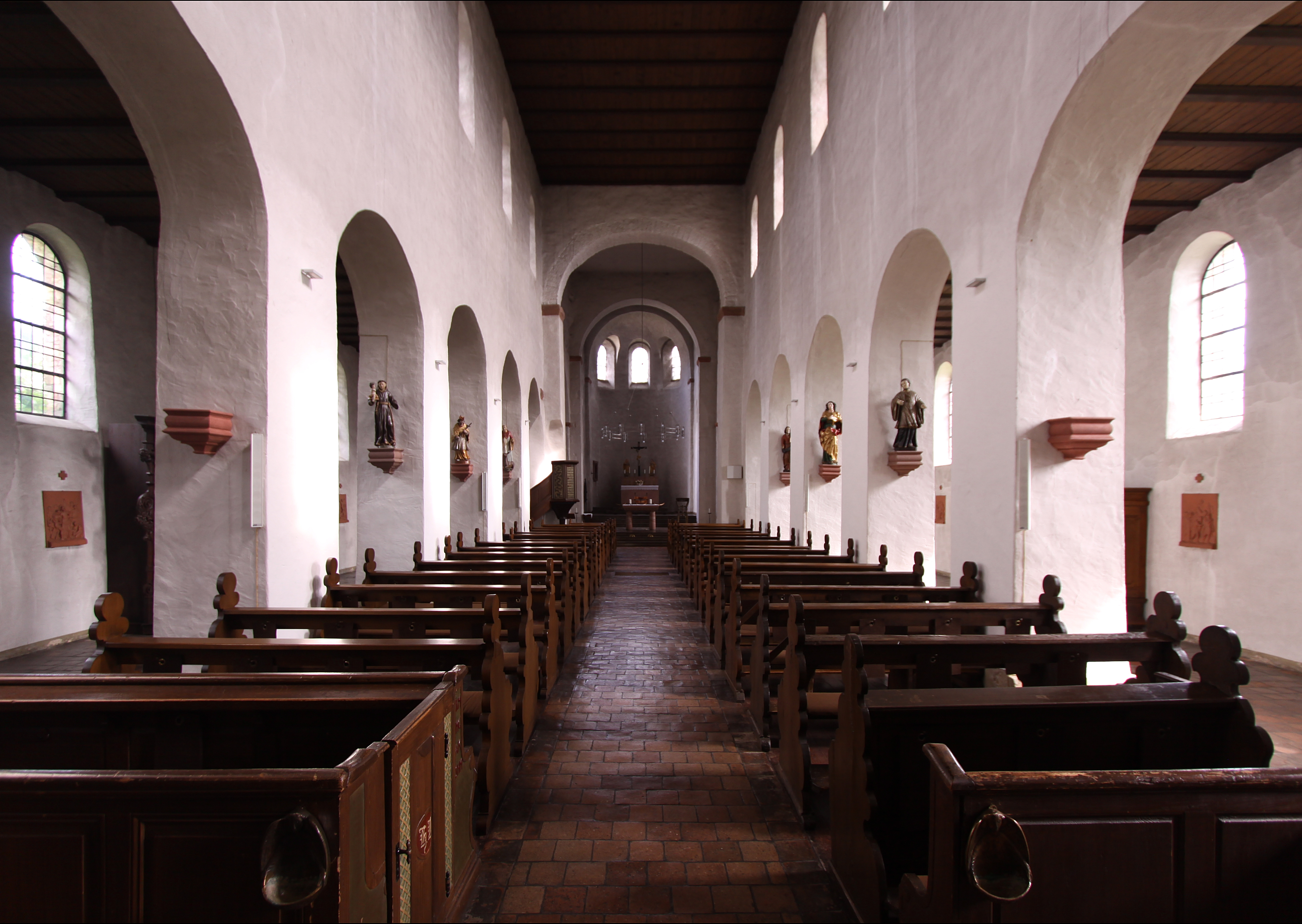 St Ägidius Basilika in Mittelheim am Rhein - Blick ins Mittelschiff